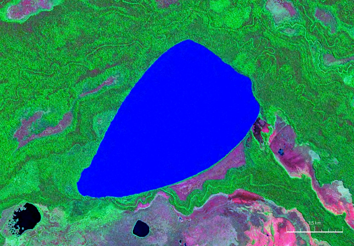 Vista satelital de la laguna Nuevo Mundo ubicada entre los departamentos bolivianos del Beni y Santa Cruz.